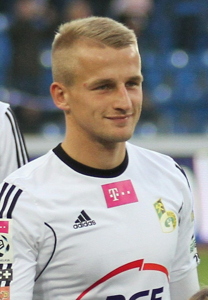 Łukasz Broński w barwach GKSu Bełchatów.